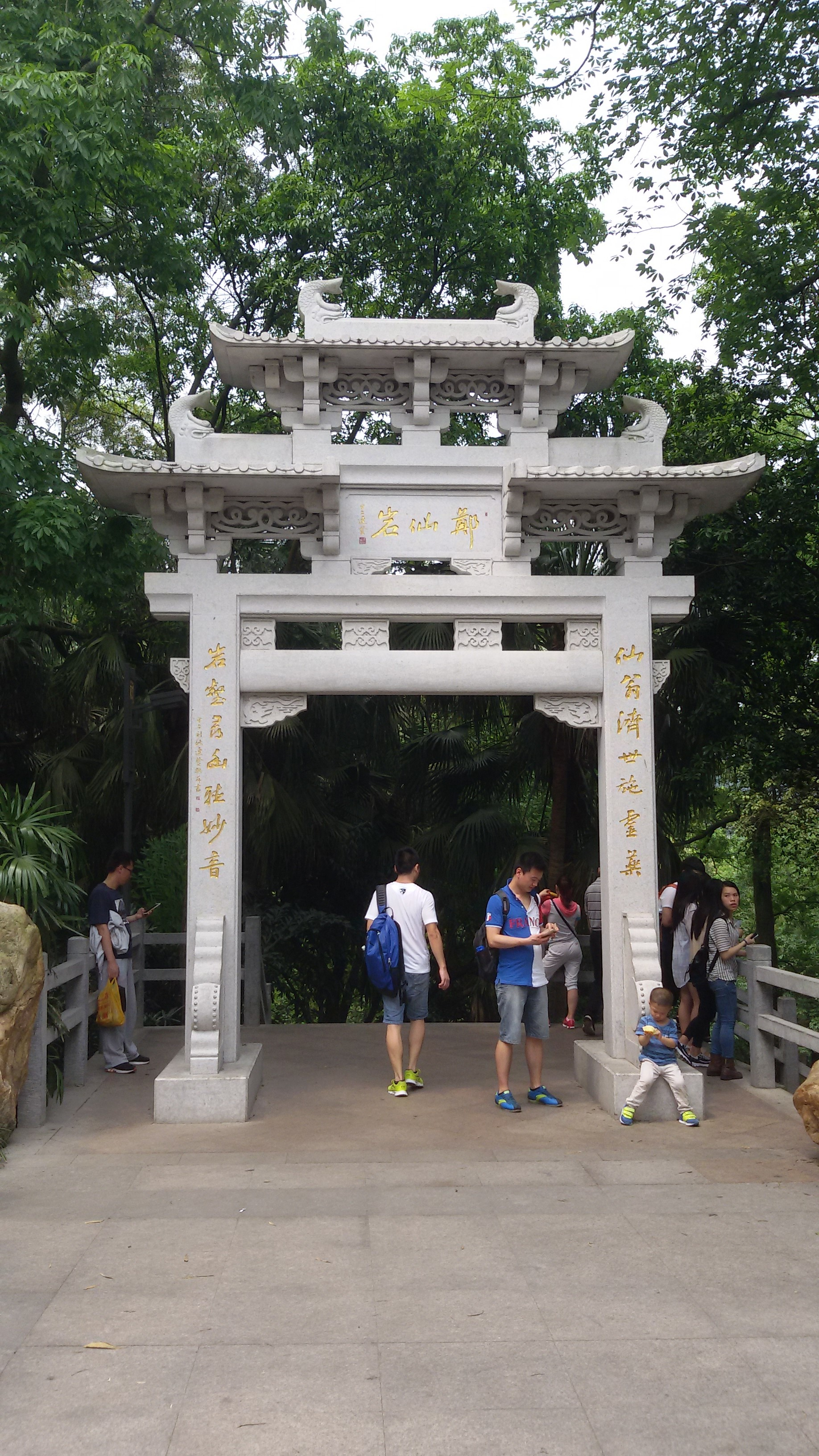 粵語: 廣州白雲山風景區 — 鄭先岩嘅牌坊